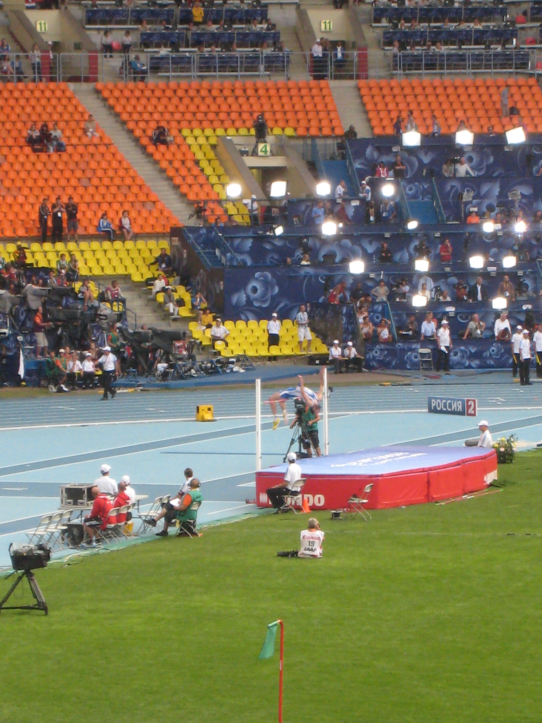 Чемпионат мира по лёгкой атлетике 2013. Греческий прыгун в высоту Констадинос Банотис